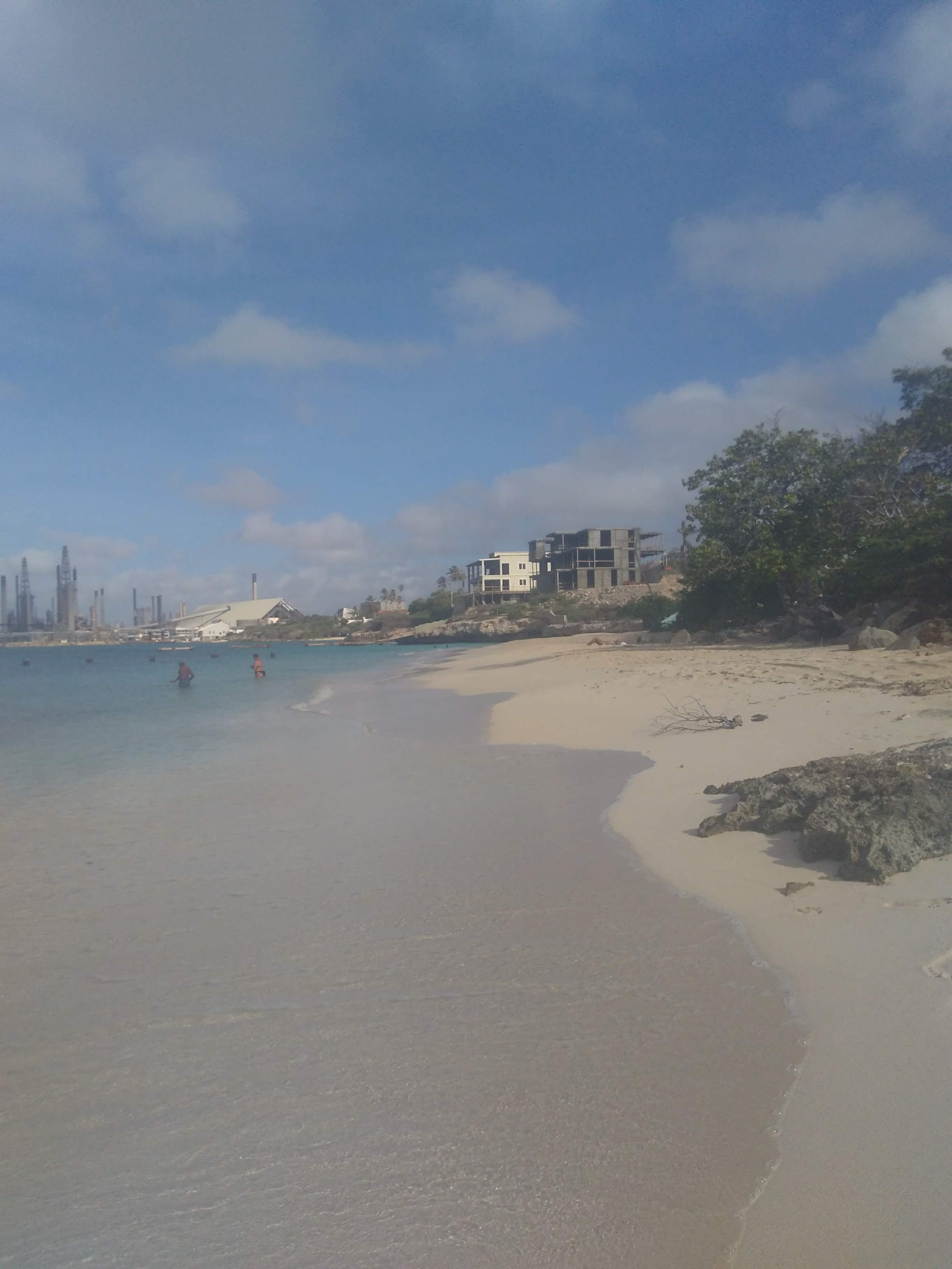 In de achtergrond de Raffinaderij van Aruba vanuit the kant van Rodgers Beach genomen op